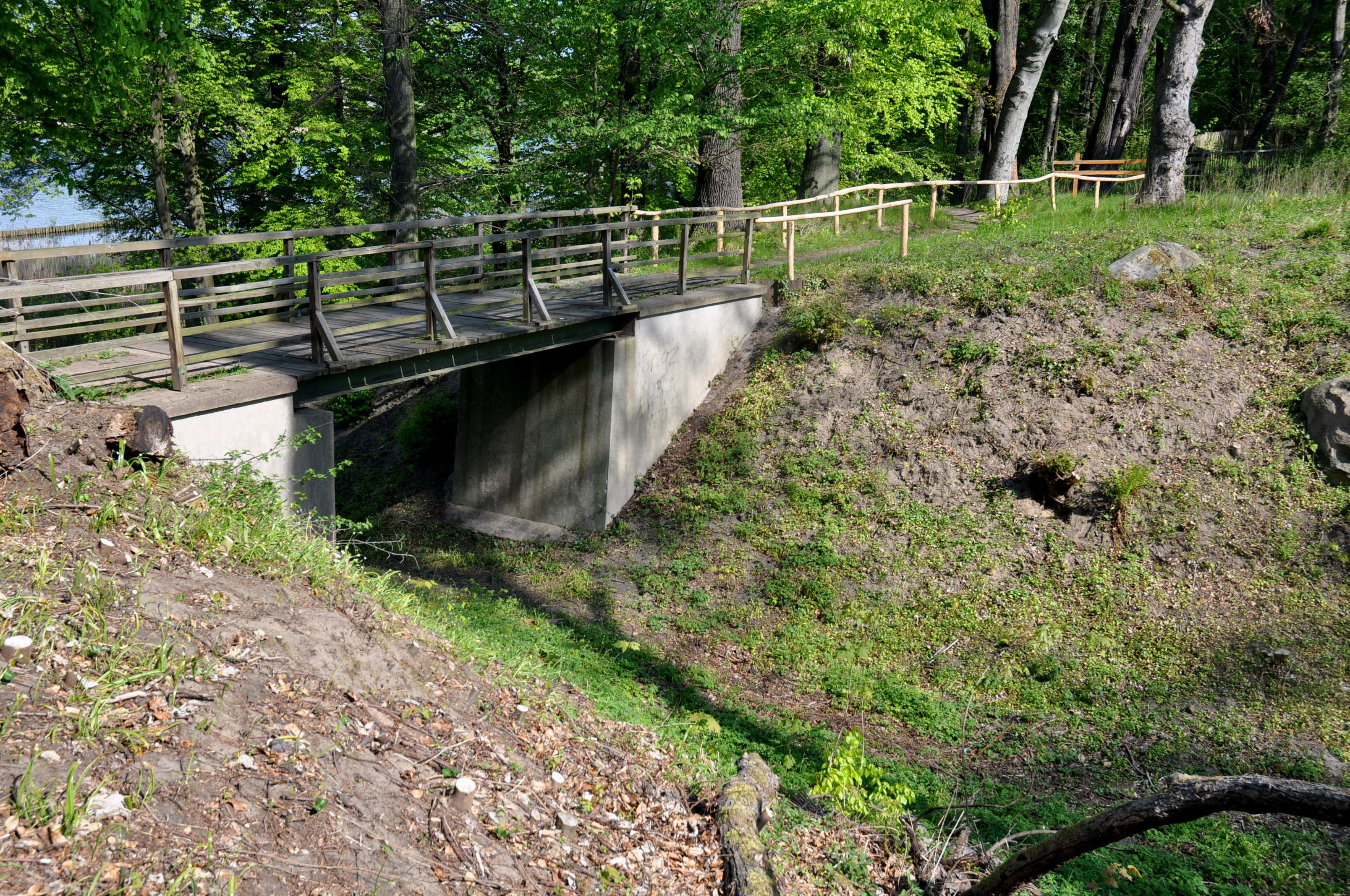 Park Klein-Glienicke, die neue Hubertusbrücke (2015)